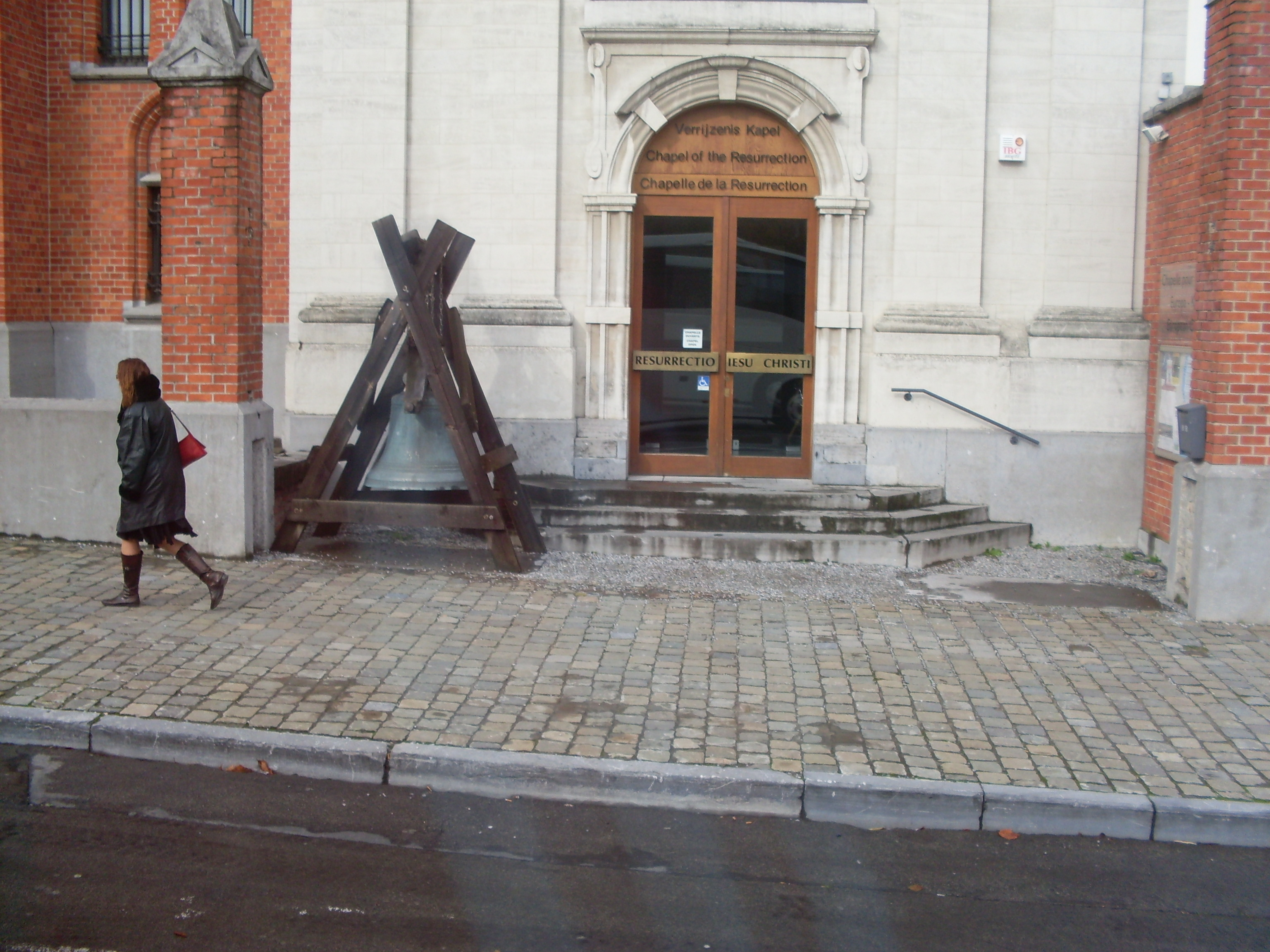 Chapel of the Resurrection (auch Chapel for Europe genannt) in Brüssel